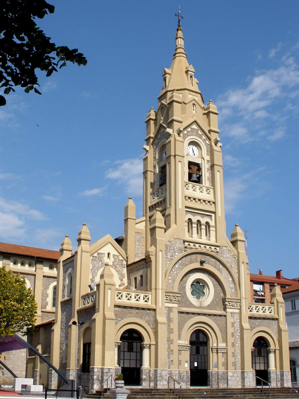 Iglesia de la de la Transfiguración del Señor, en Trapagaran, Bizkaia